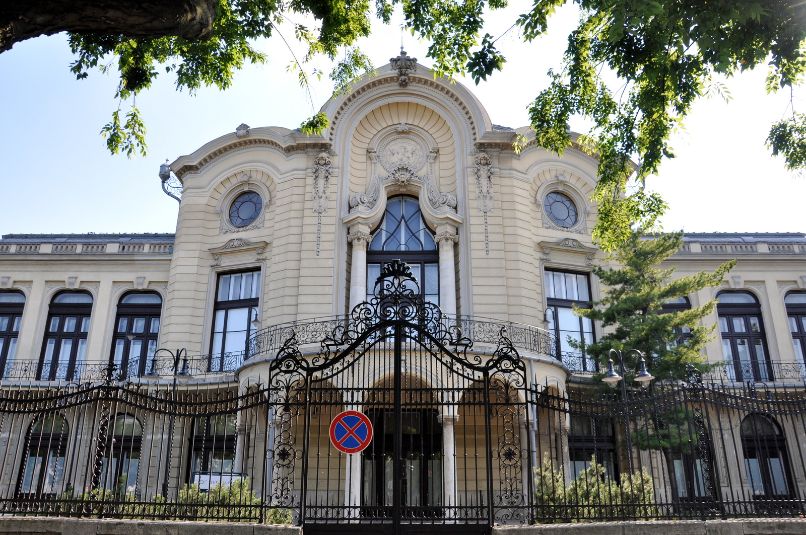 Stefánia Palace